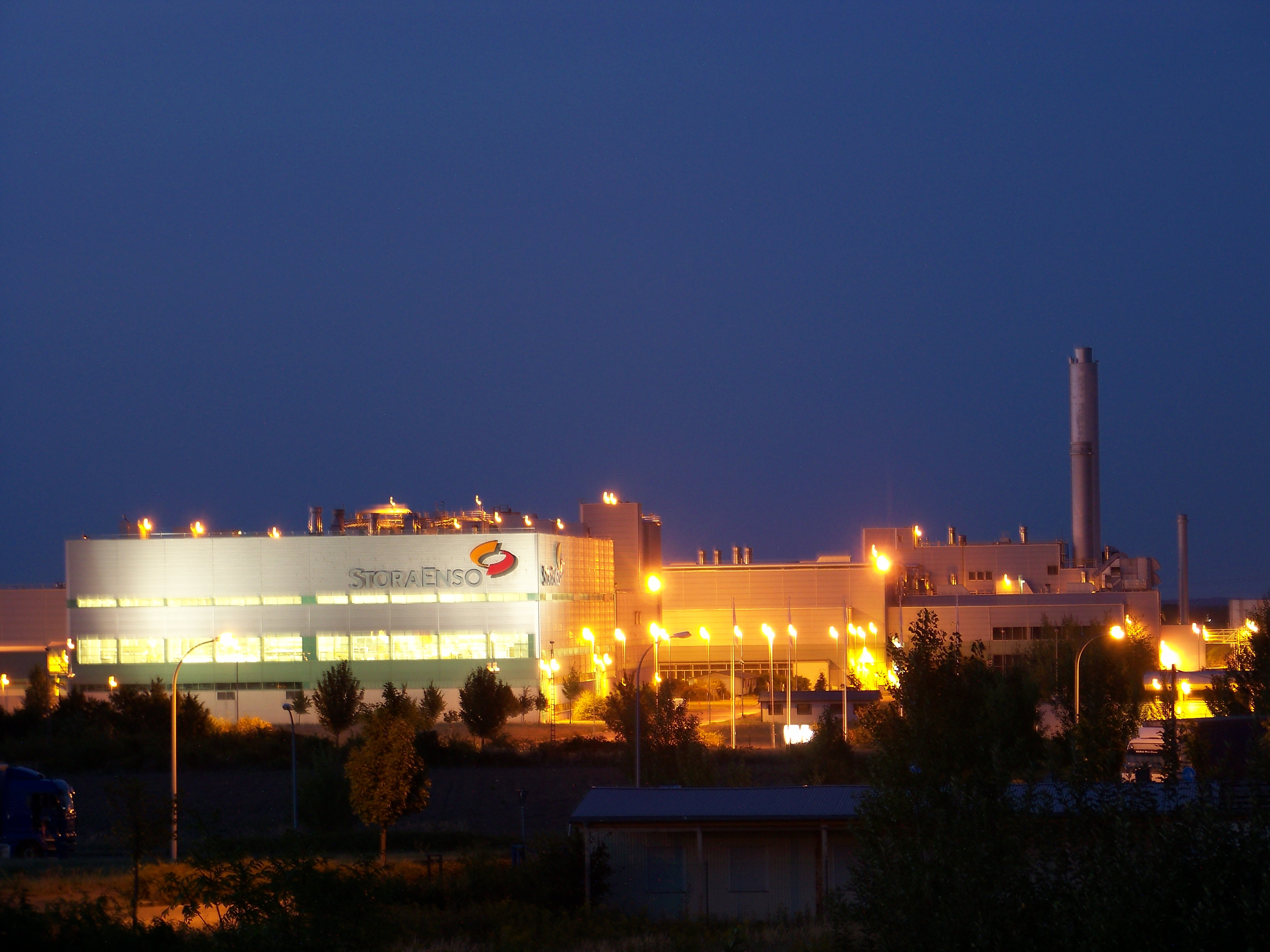 Die StoraEnso-Recycling-Paperfabrik im Industriegebiet am Schanzberg in Eilenburg.